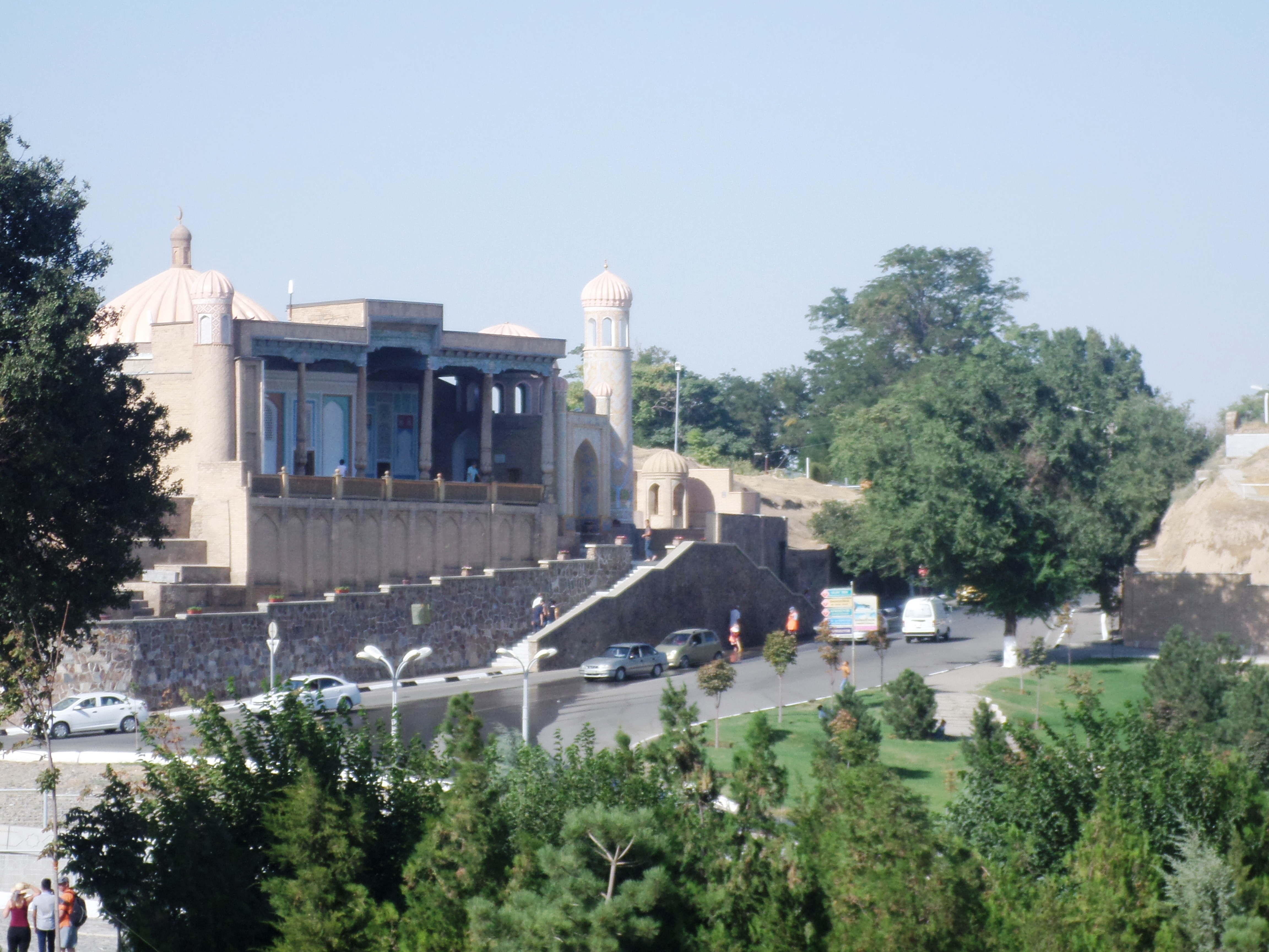 Достопримечательности Самарканда, Мечеть Хызр